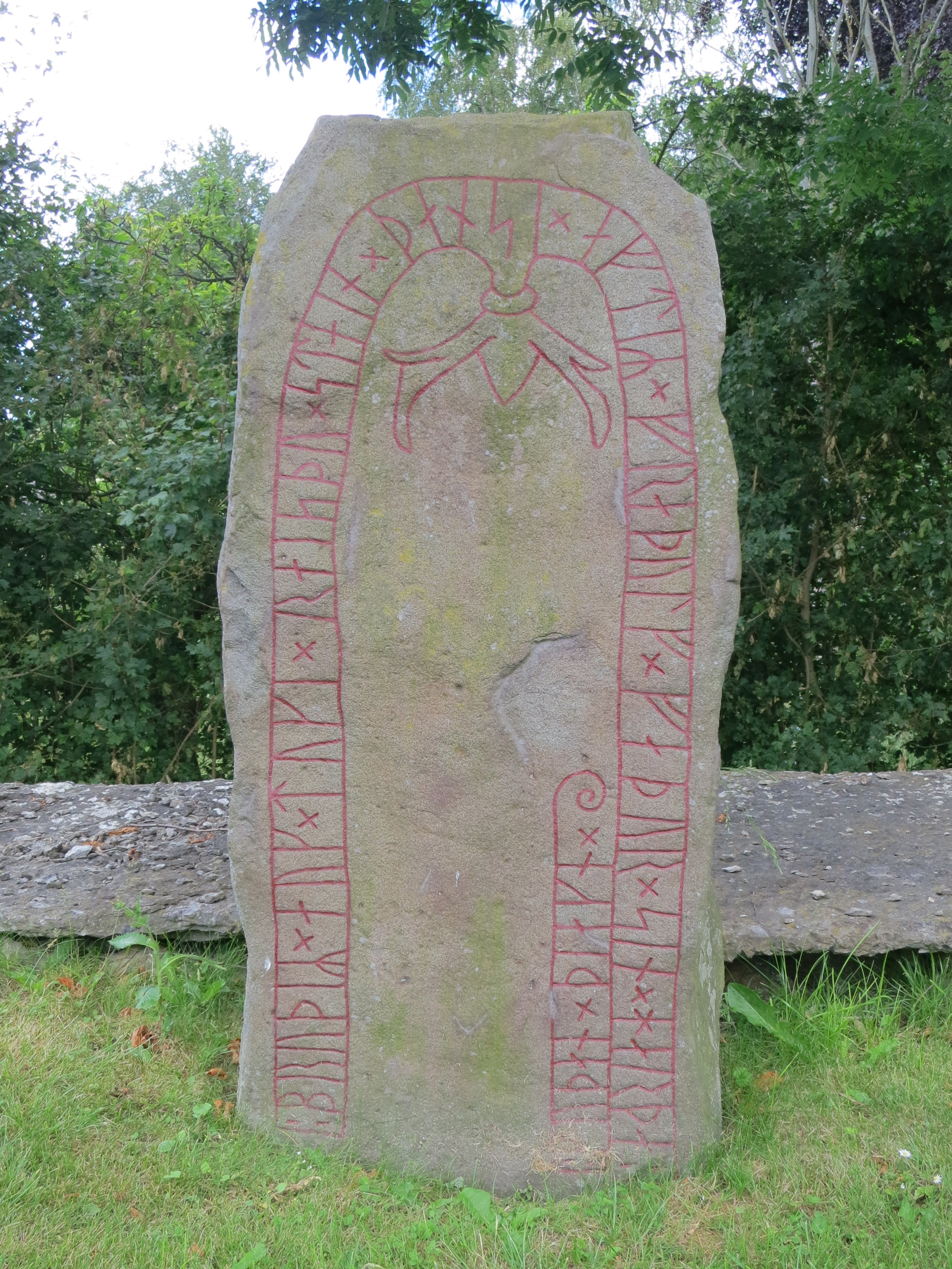 DR 343 Östra Herrestadsstenen